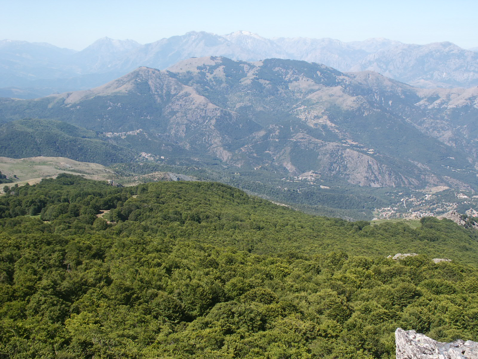 vallerustie, castagniccia, corsica